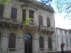 Muestra la fachada del Rectorado de la UNNE en la ciudad de Corrientes, frente a la plaza 25 de Mayo.